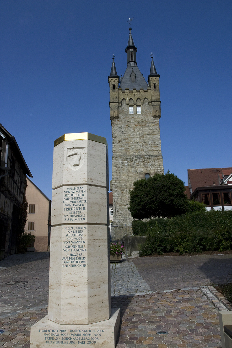 Bad Wimpfen - Stauferstele am Steinhaus zwischen dem Blauen Turm und dem Roten Turm